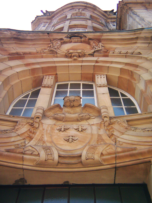 Einzelheiten von Bauelementen des Westeingangs des Görres-Gymnasiums in Düsseldorf an der Bastionstraße. Die Eule als Symbol der Weisheit wacht über dem Wappen mit drei Bienen, dem Symbol des Fleißes.